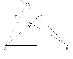 homothéties dans un trapèze. Image personnelle. Licence GFDL